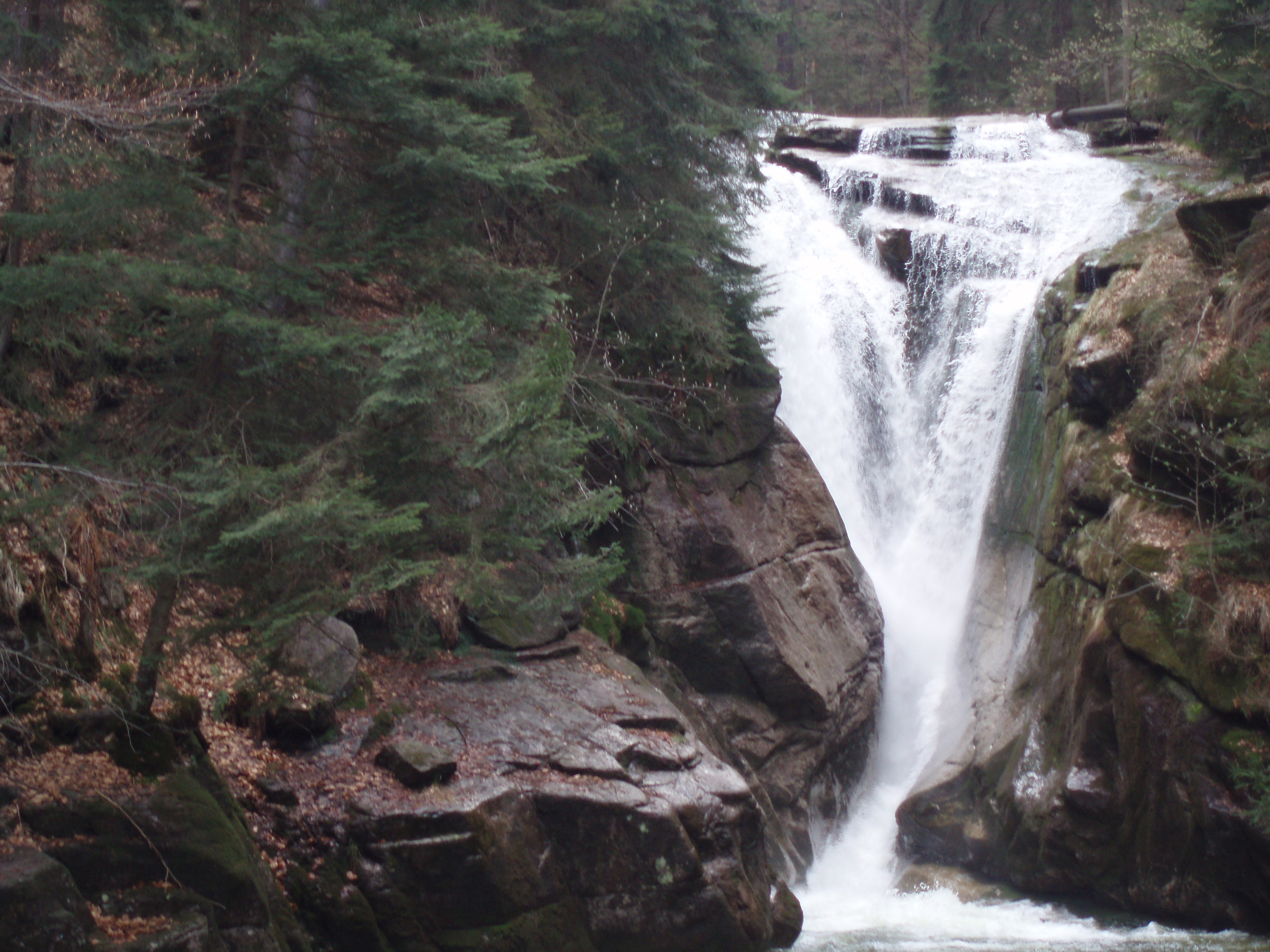 Szklarka waterfall, Poland